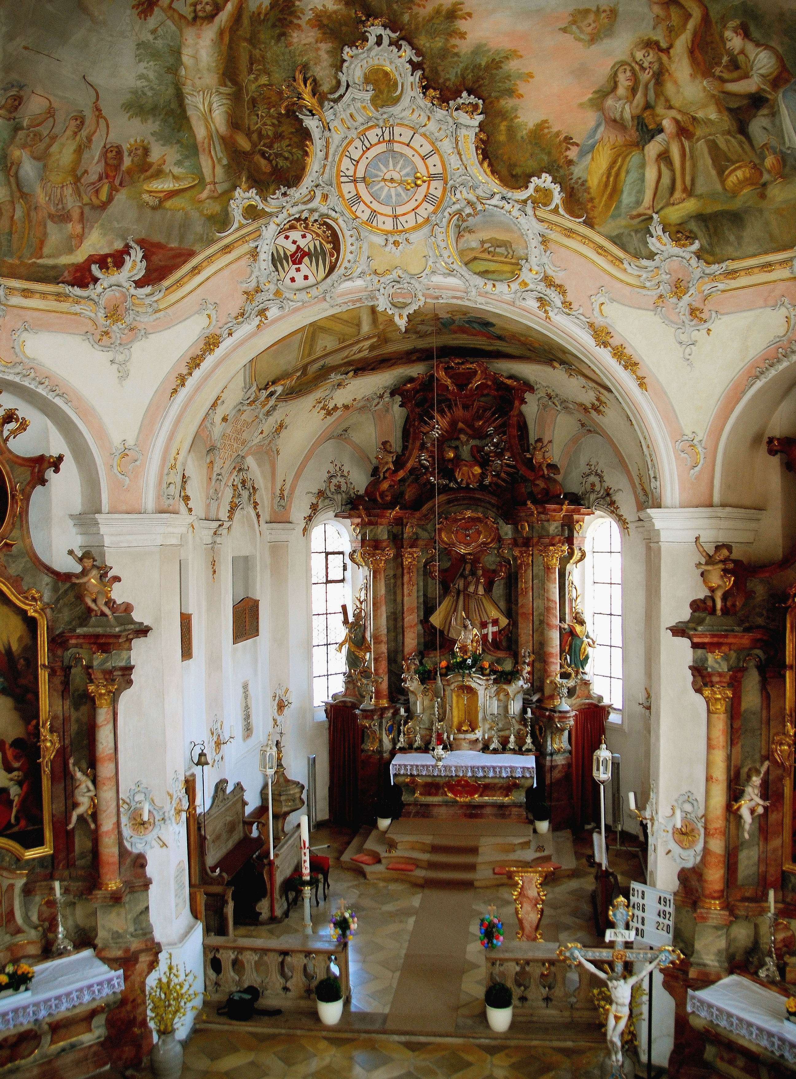 Starnberg, OT Perchting, Kirche Mariä Heimsuchung. Blick vom Langhaus in den Chorraum der Pfarrkirche. Oberhalb des Chorbogens die Stuckkartusche von Franz Xaver Feuchtmayer d. J. mit Uhr und den Wappen von Anton Clemens Graf Toerring-Seefeld (links) und des Klosters Polling (rechts), den Stiftern der Ausstattung der Kirche.